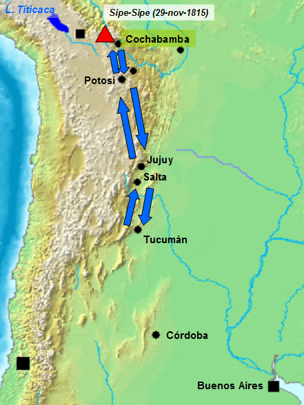 Mapa de la Tercera Campaña del Ejército del Norte de las Provincias Unidas del Río de la Plata, 1815, durante la Guerra de Independencia Hispanoamericana.